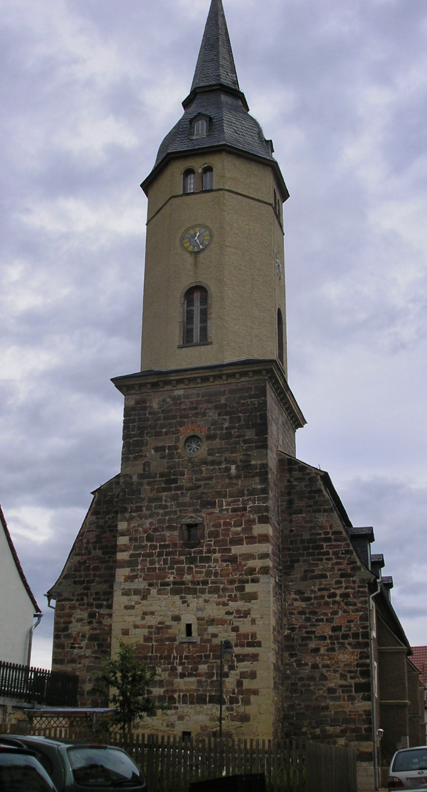 Stadtkirche in Bürgel (Thüringen).